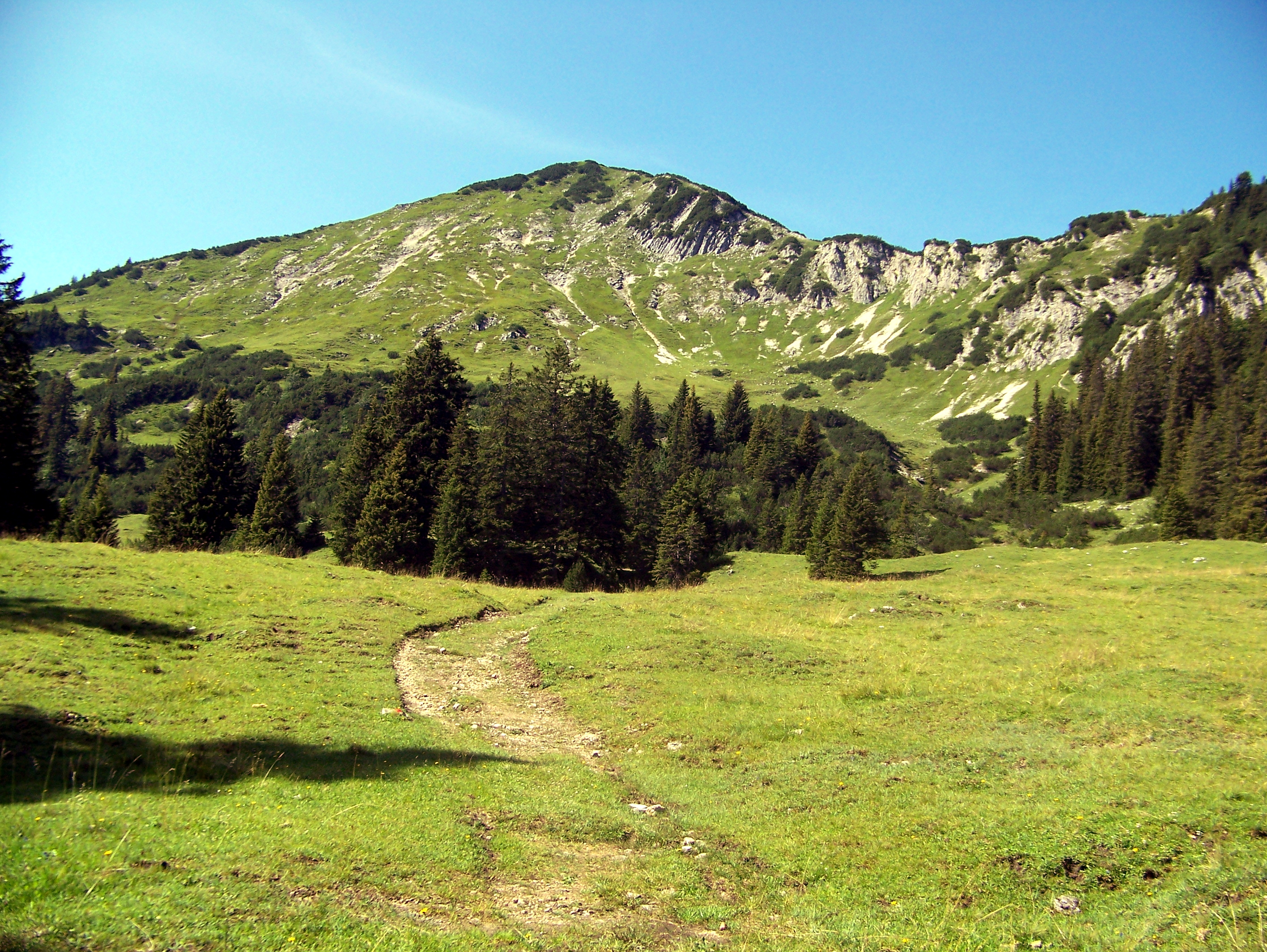 Ochsenälpeleskopf